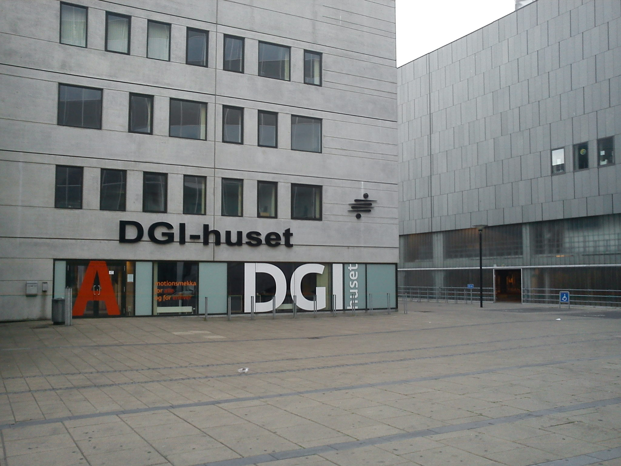 DGI-huset i Aarhus